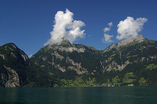 Blick von der Tellskapelle hinüber nach Bauen (Nr. 03.1-8815)